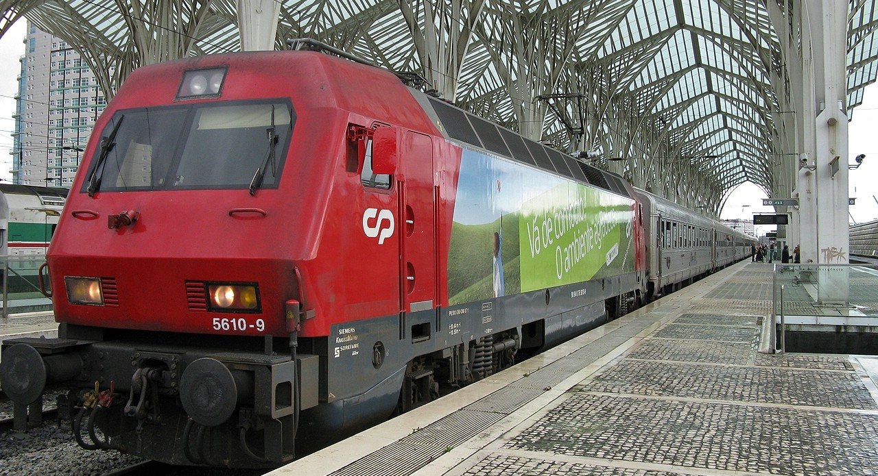 Isto podia acontecer mais vezes, não? Era lindo, e não se perdia a "magia" deste comboio. Comboio de reforço especial "SudExpress clássico" composto por 5610 + 5 sorefames de compartimento 2ª classe + carruagem Restaurante + carruagem Camas Uhansa. Este comboio circulou entre 19 e 23 de Abril de 2010 como reforço ao comboio hotel Sud Expresso devido à lotação do mesmo causada pelo encerramento do espaço aéreo europeu devido a uma nuvem de cinzas proveniente de um vulcão islandês.